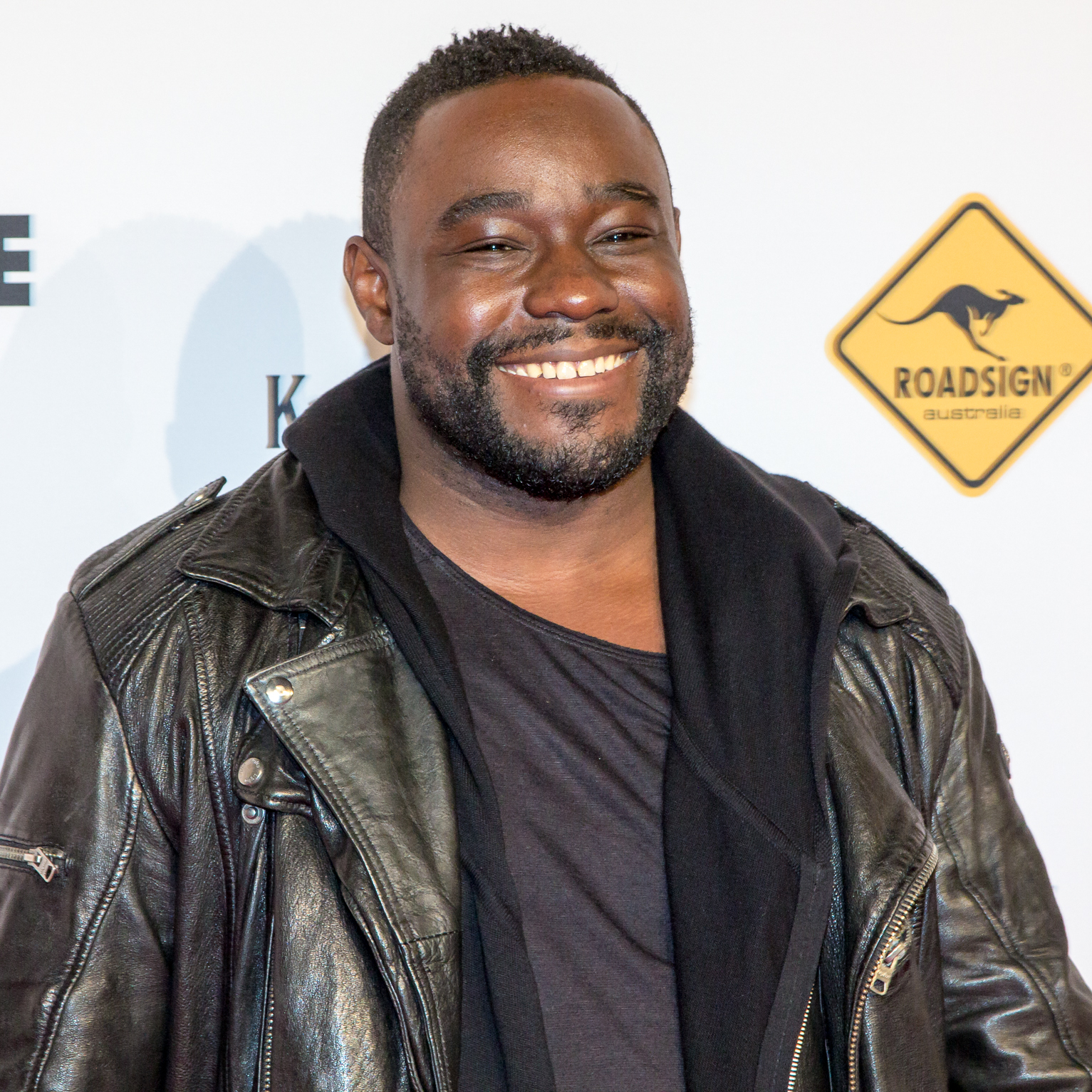 1liVE Krone 2015 - Nelson Müller